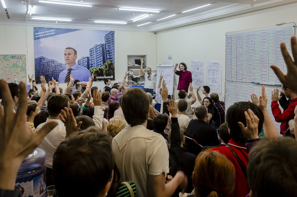 Максим Кац проводит тренинг в штабе Навального